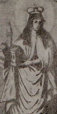 Anna von Böhmen († 1265)